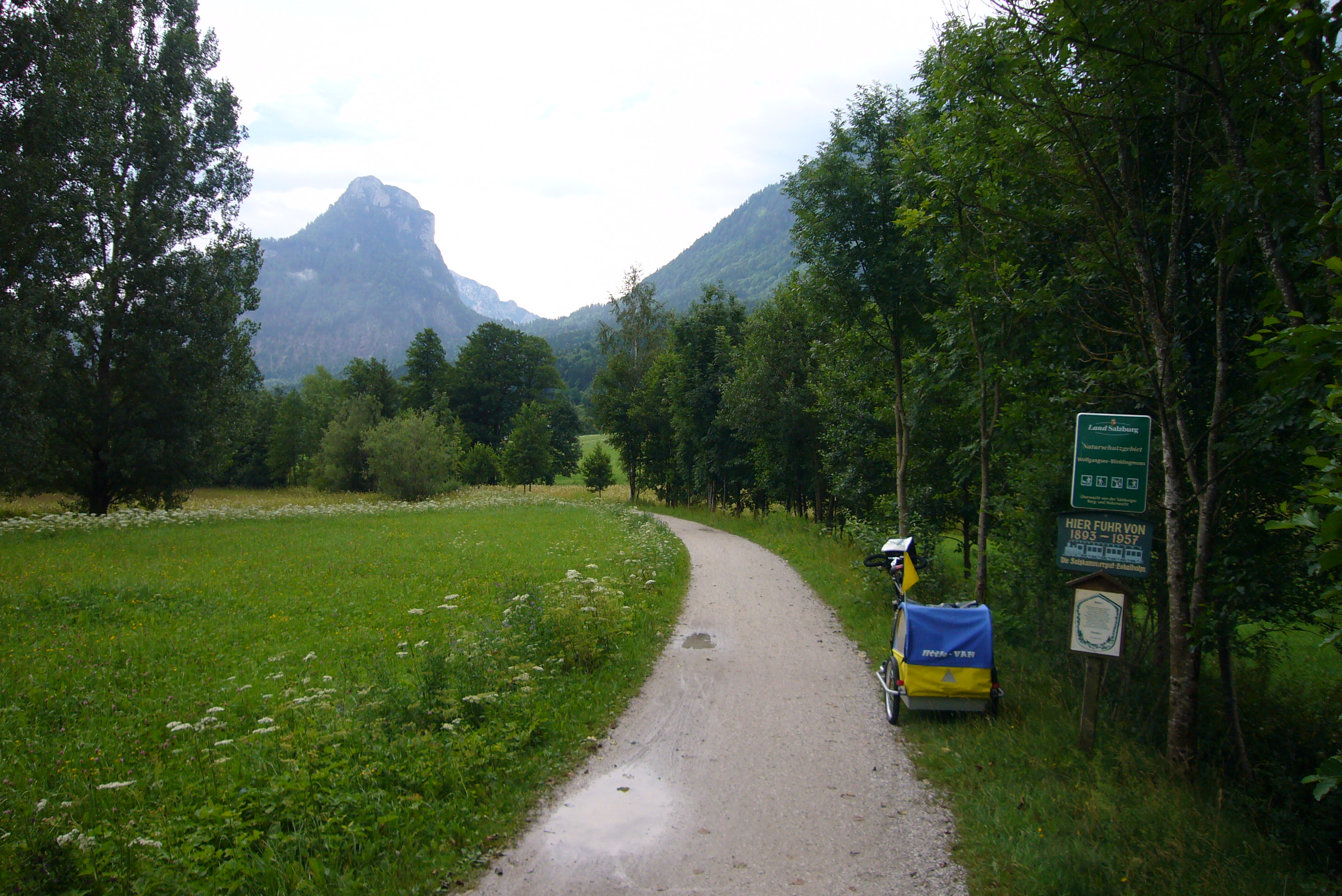 Radweg auf der Trasse der ehem. Salzkammergut-Lokalbahn